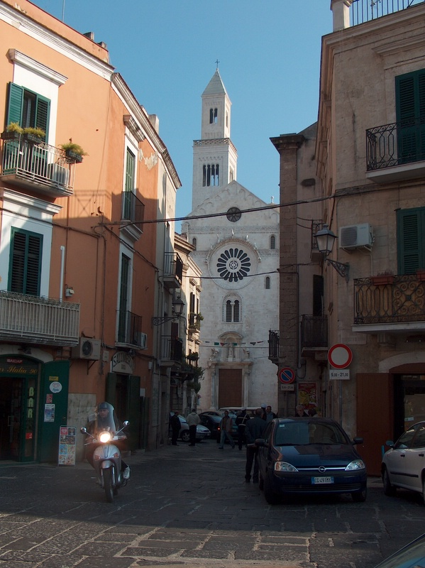 Vista tra le viuzze, ecco spuntare la cattedrale di S. Sabino.